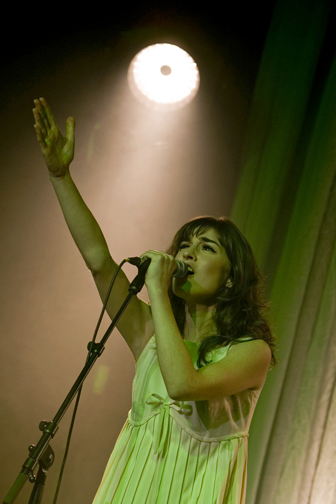 Rita RedShoes no Coliseu de Lisboa, 12 de Abril 2008.